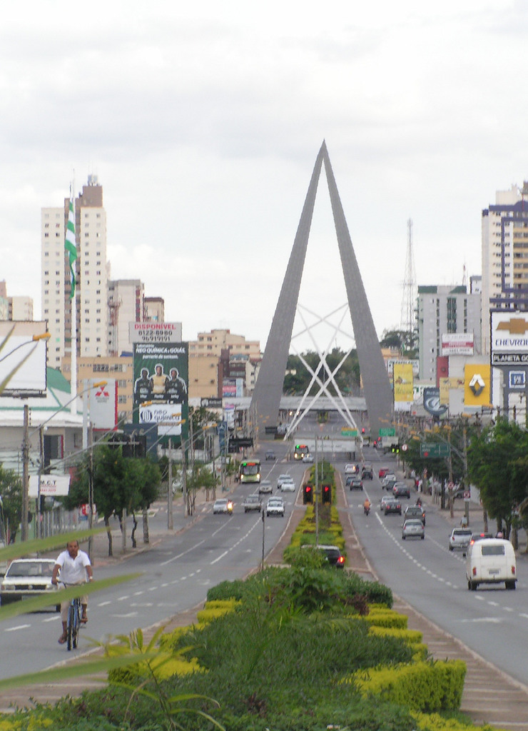 Av. 85, Goiânia. Ao fundo, monumento e viaduto do cruzamento com a Av. T-63.